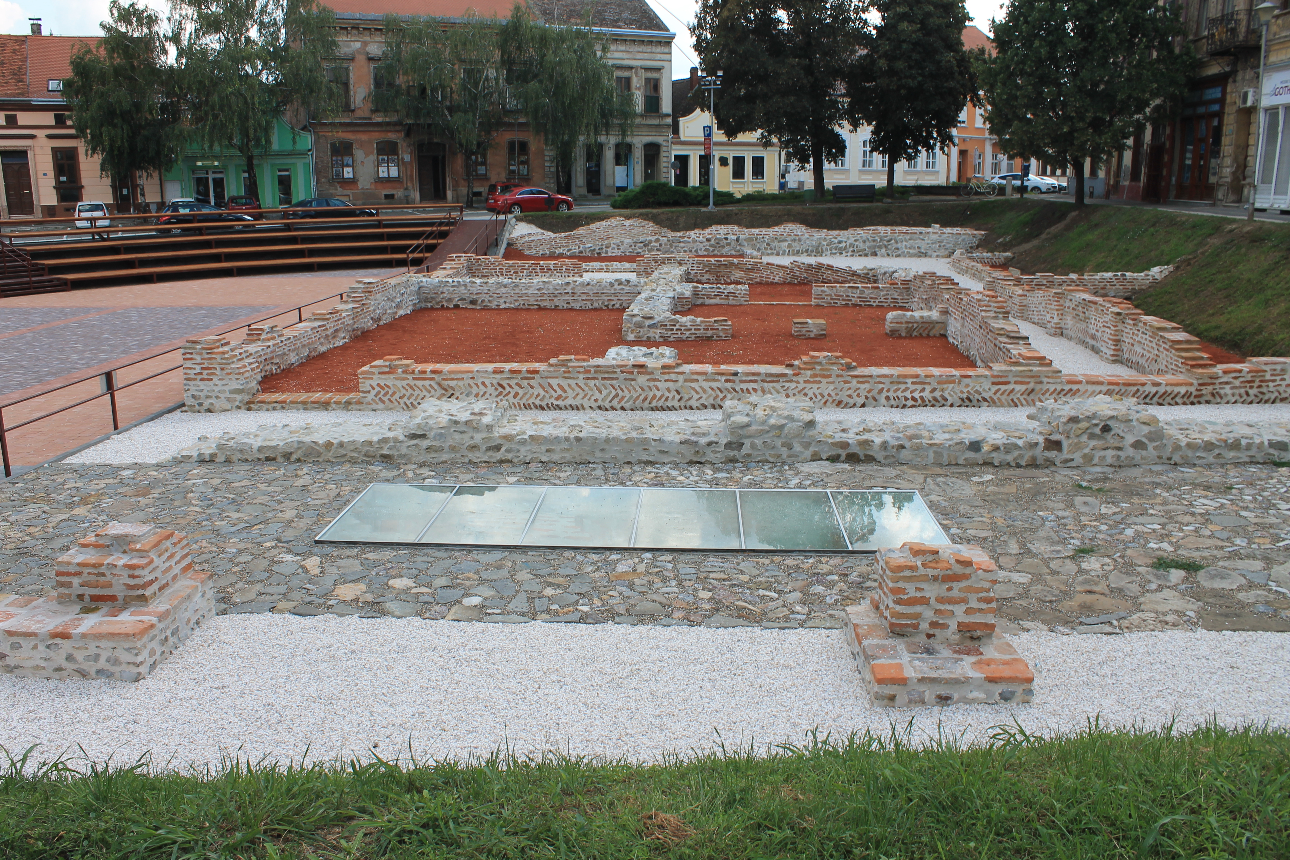 Žitni trg u Sremskoj Mitrovici